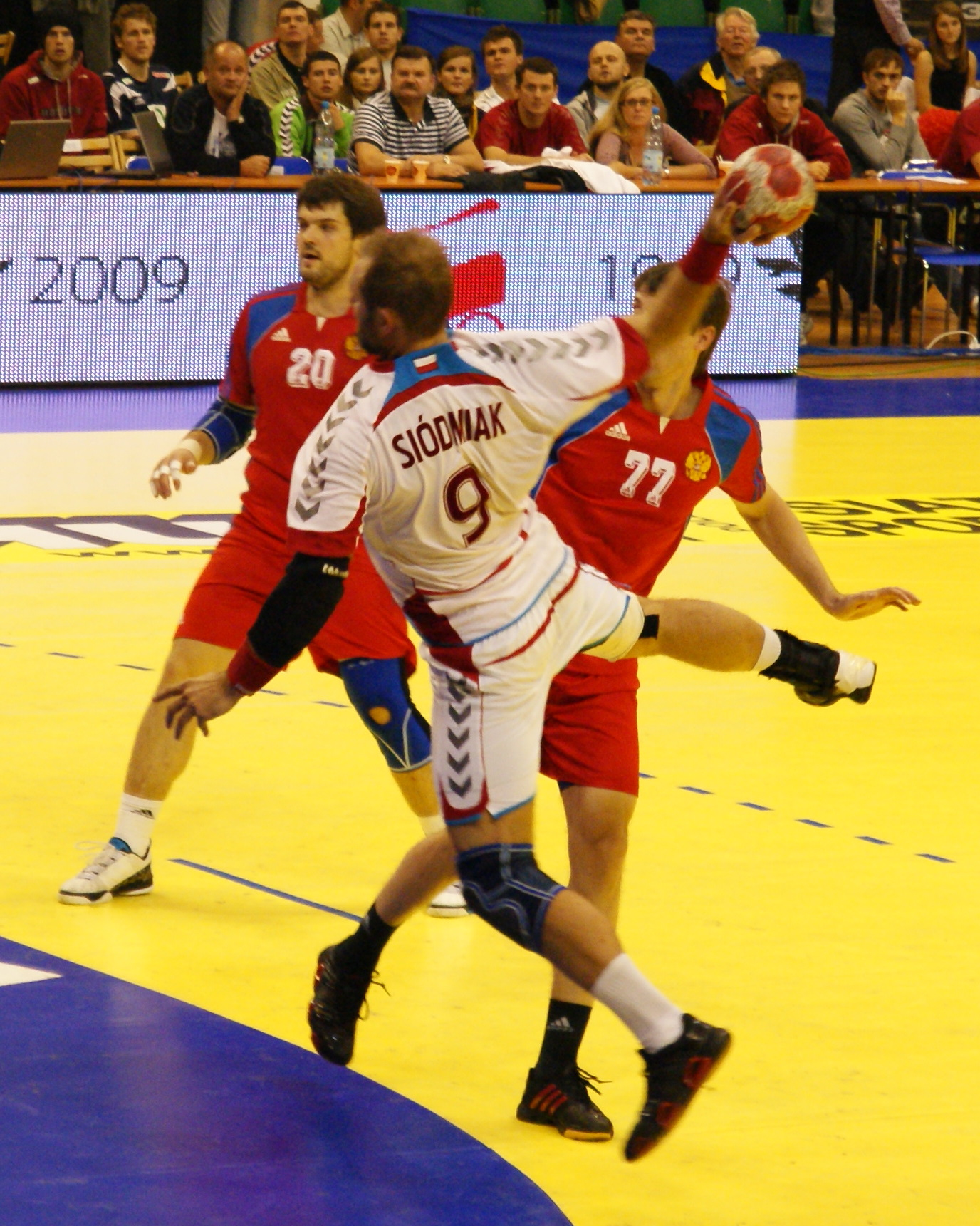 Artur Siódmiak Mecz Polska - Rosja, Turniej Reprezentacji Narodowych Mężczyzn w Piłce Ręcznej, Hala widowiskowo-sportowa Arena, Poznań, Polska.